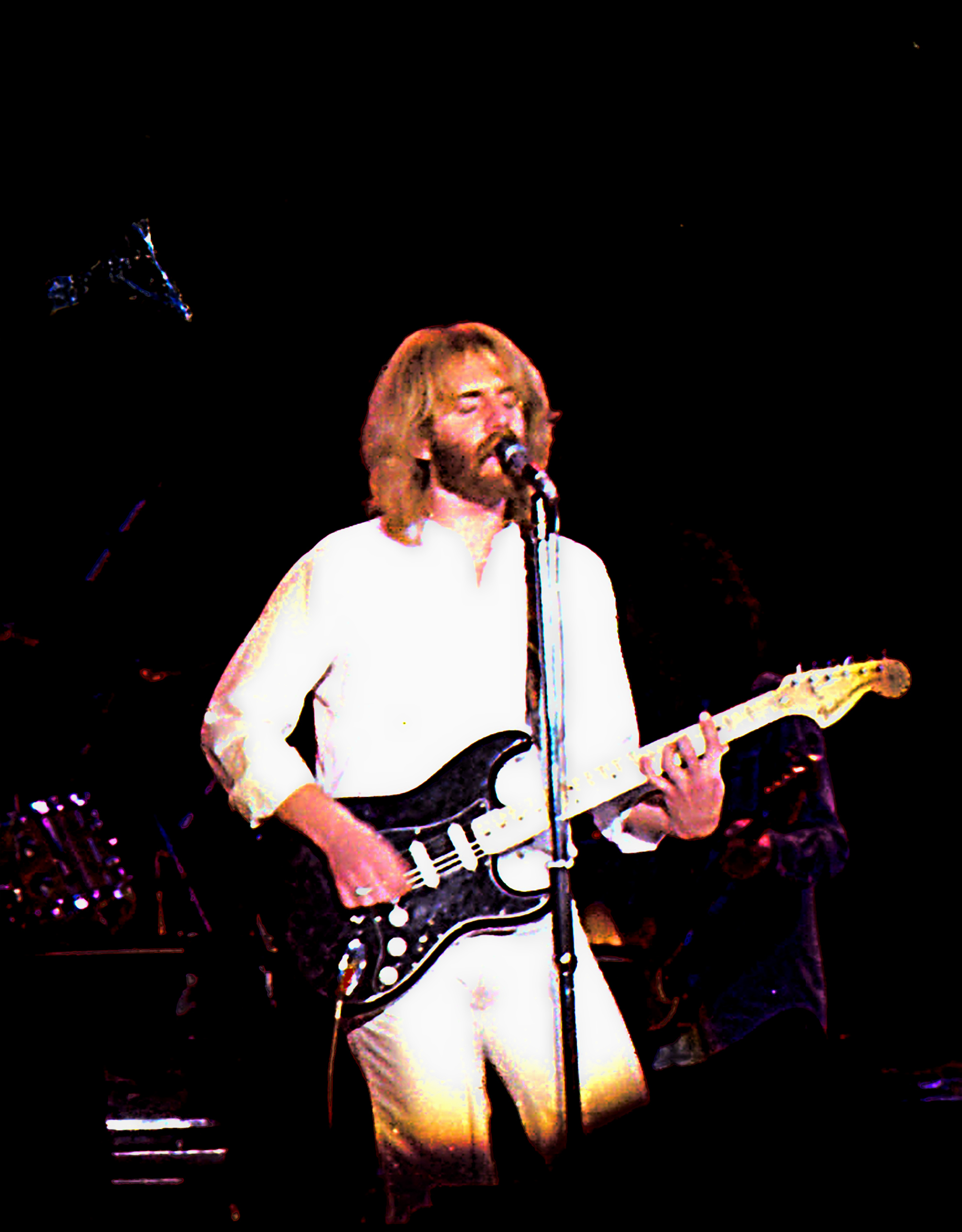 Andrew Gold live in Amsterdam samen met Linda Ronstadt